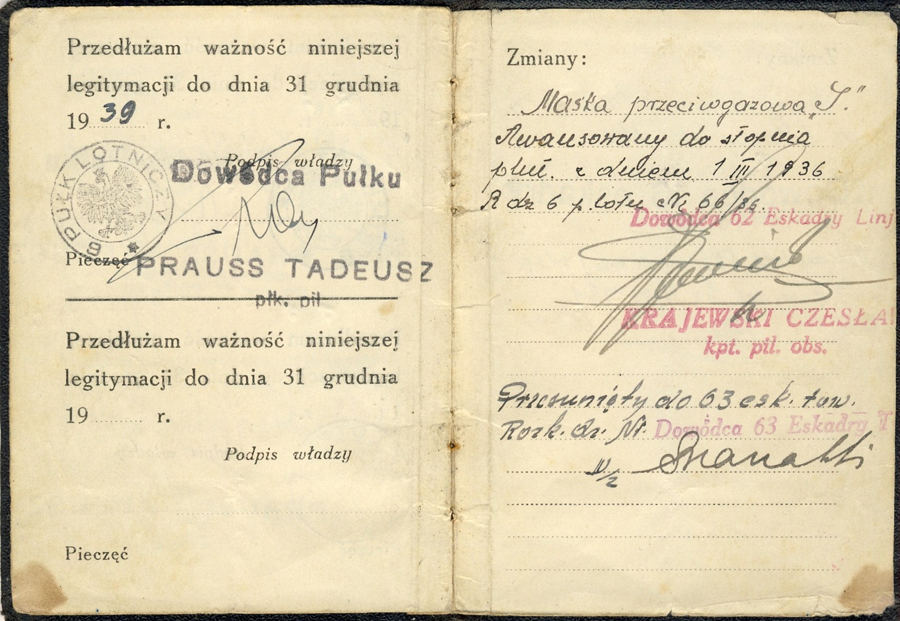 Legitymacja osobista Mieczysława Halickiego 3